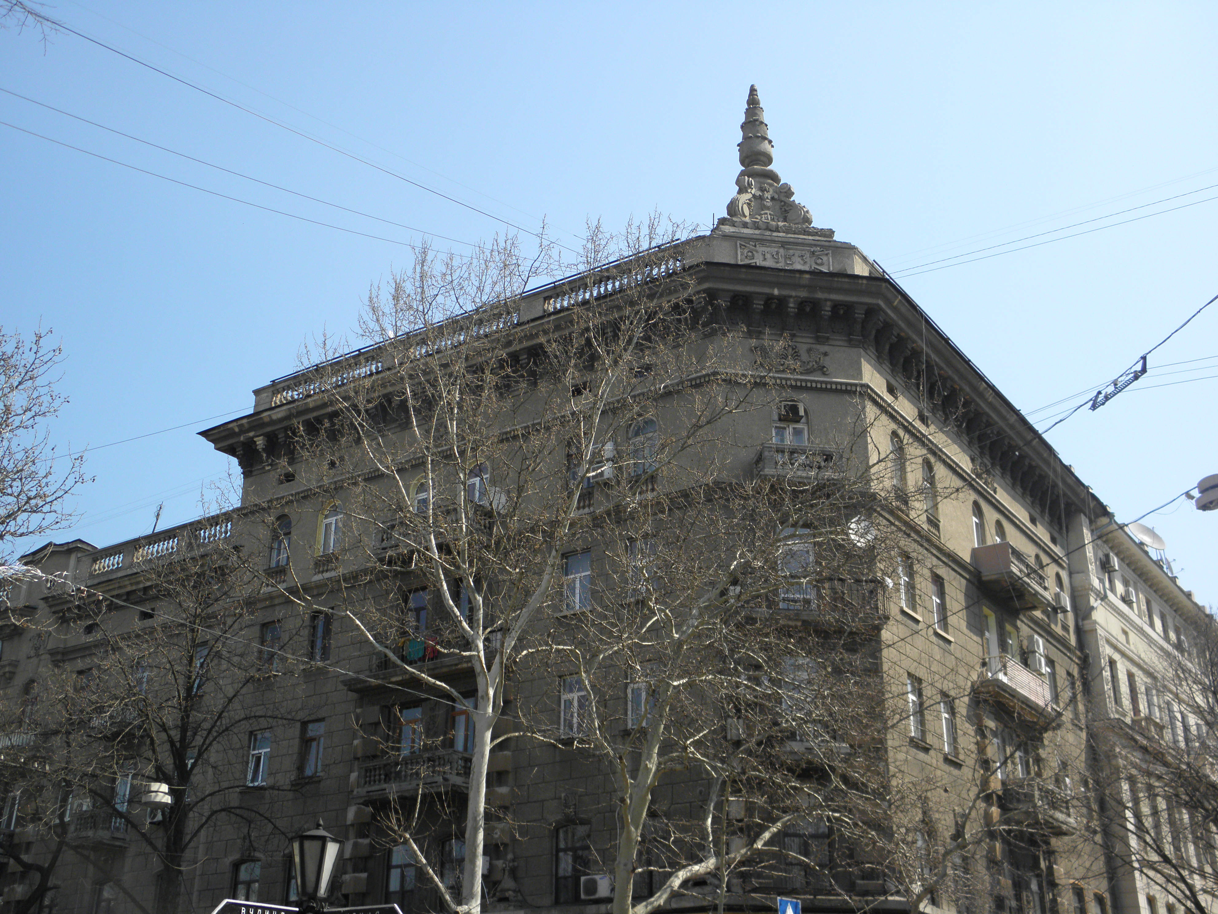 Будинок китобійної флотилії, в якому жив М.Г. Водяной - артист оперети, народний артист СРСР, Одеса, Дерібасівська вул., 14/17 (ріг вулиць Дерібасівської, 14 та Катерининської, 17)